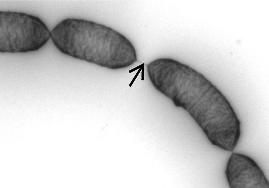 Figura 2. D. LGG wild-type. La flecha indica tabiques celulares. Microscopía Electrónica de Transmisión (TEM).